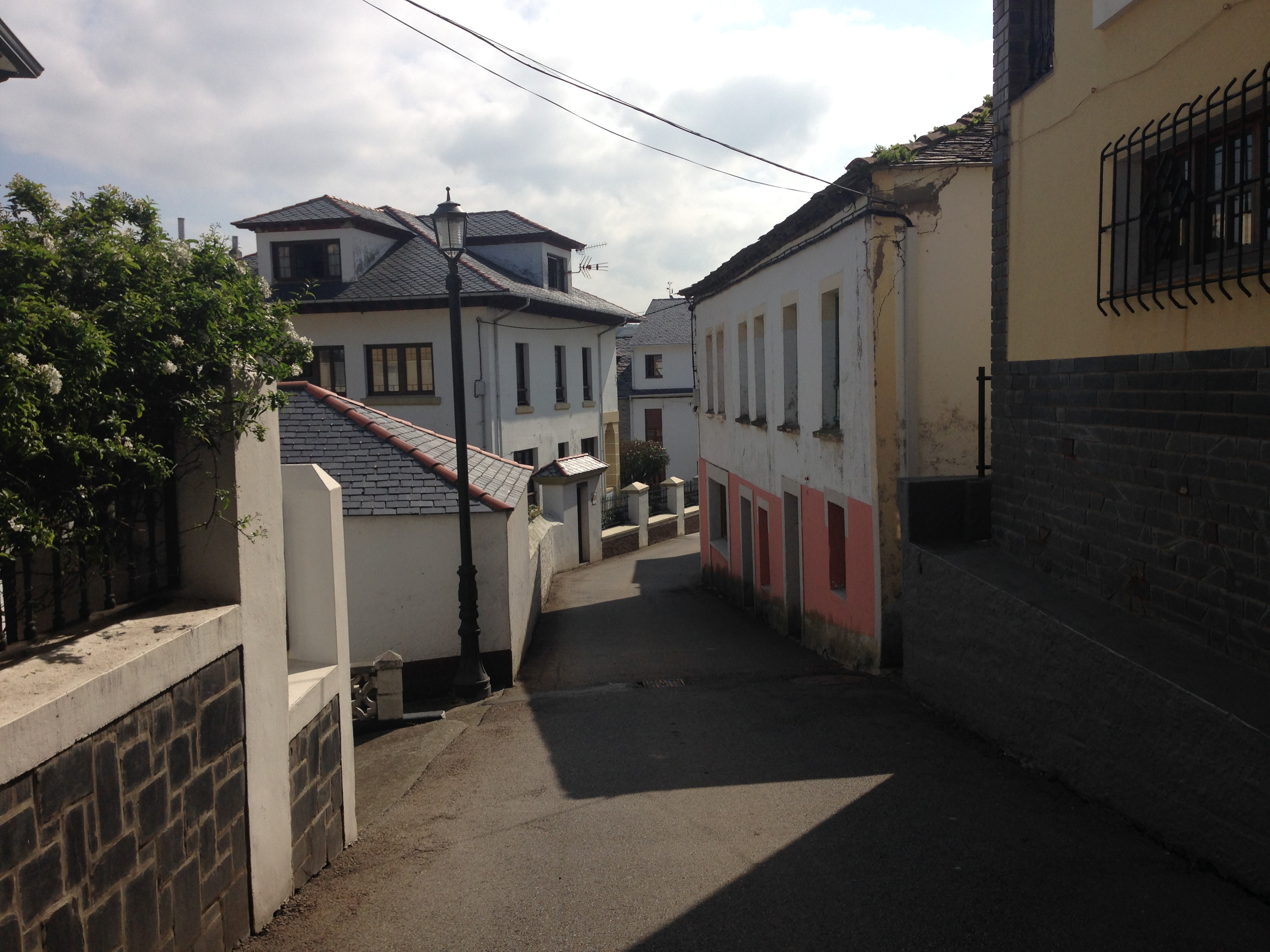 Puerto de Vega, Premio Príncipe de Asturias Pueblo Ejemplar en 1995